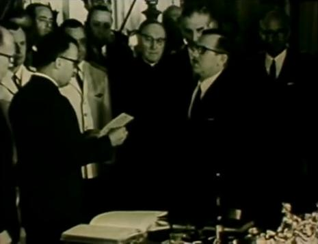 Adalbert Krieger Vasena jura como Ministro de Economía ante el dictador general (R) Juan Carlos Onganía.